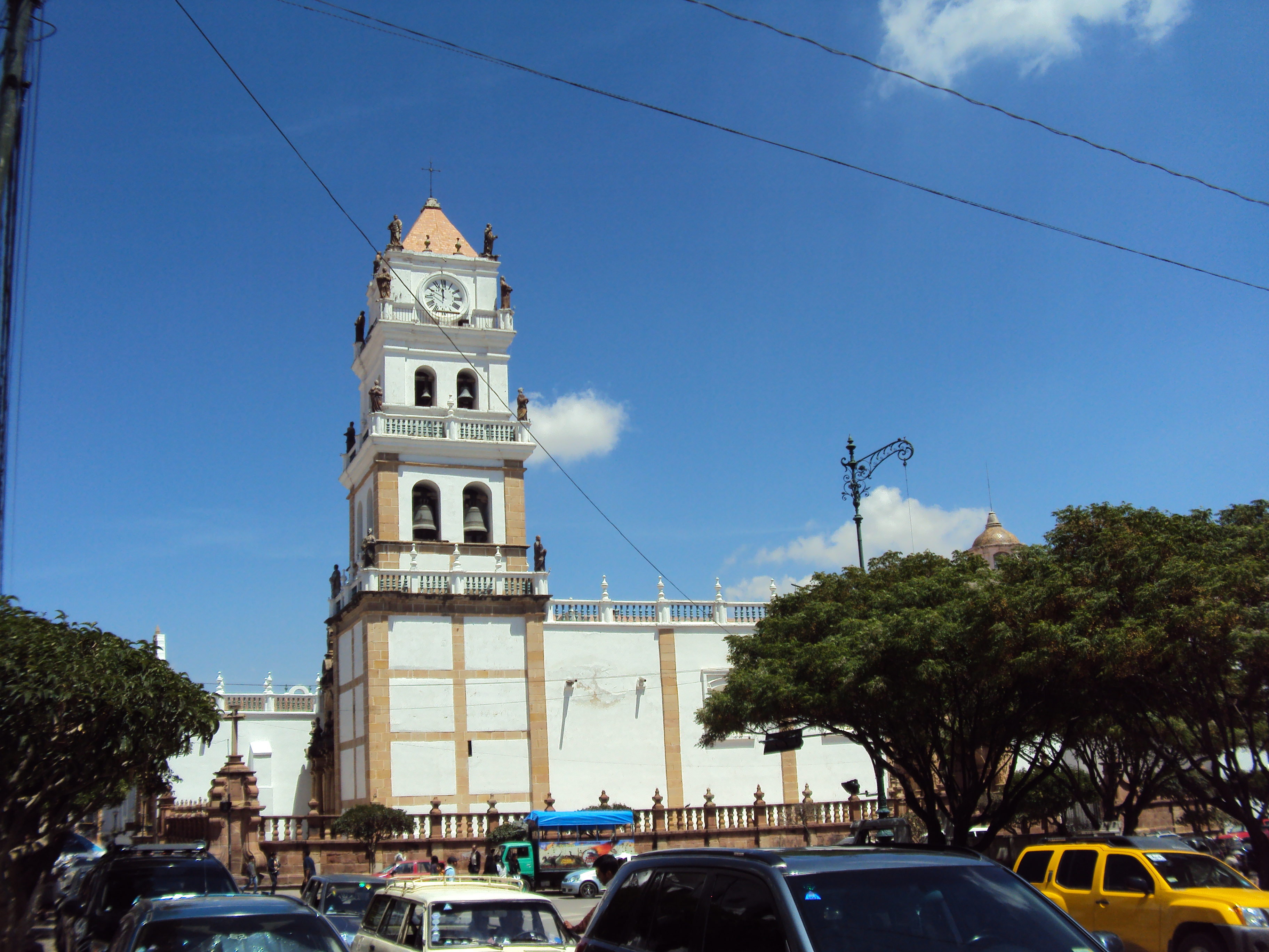 Campanario de la Catedral de Sucre, Bolivia. This medium shows the protected monument with the number H/00-001 in Bolivia.